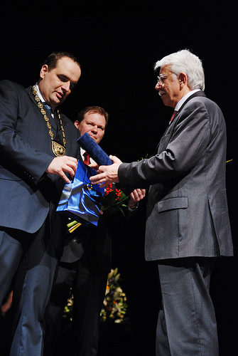 Udeľovanie cien Samuela Zocha. Pavol Frešo, Martin Berta, Pavol V. Podolay.